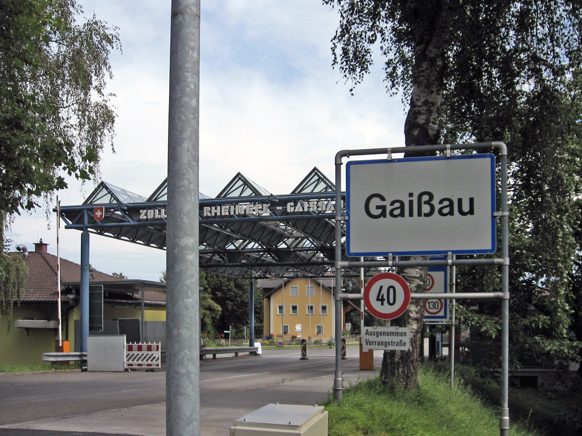 Ehemalige Granzstation in Gaißau von der Brücke über den Altrhein gesehen.